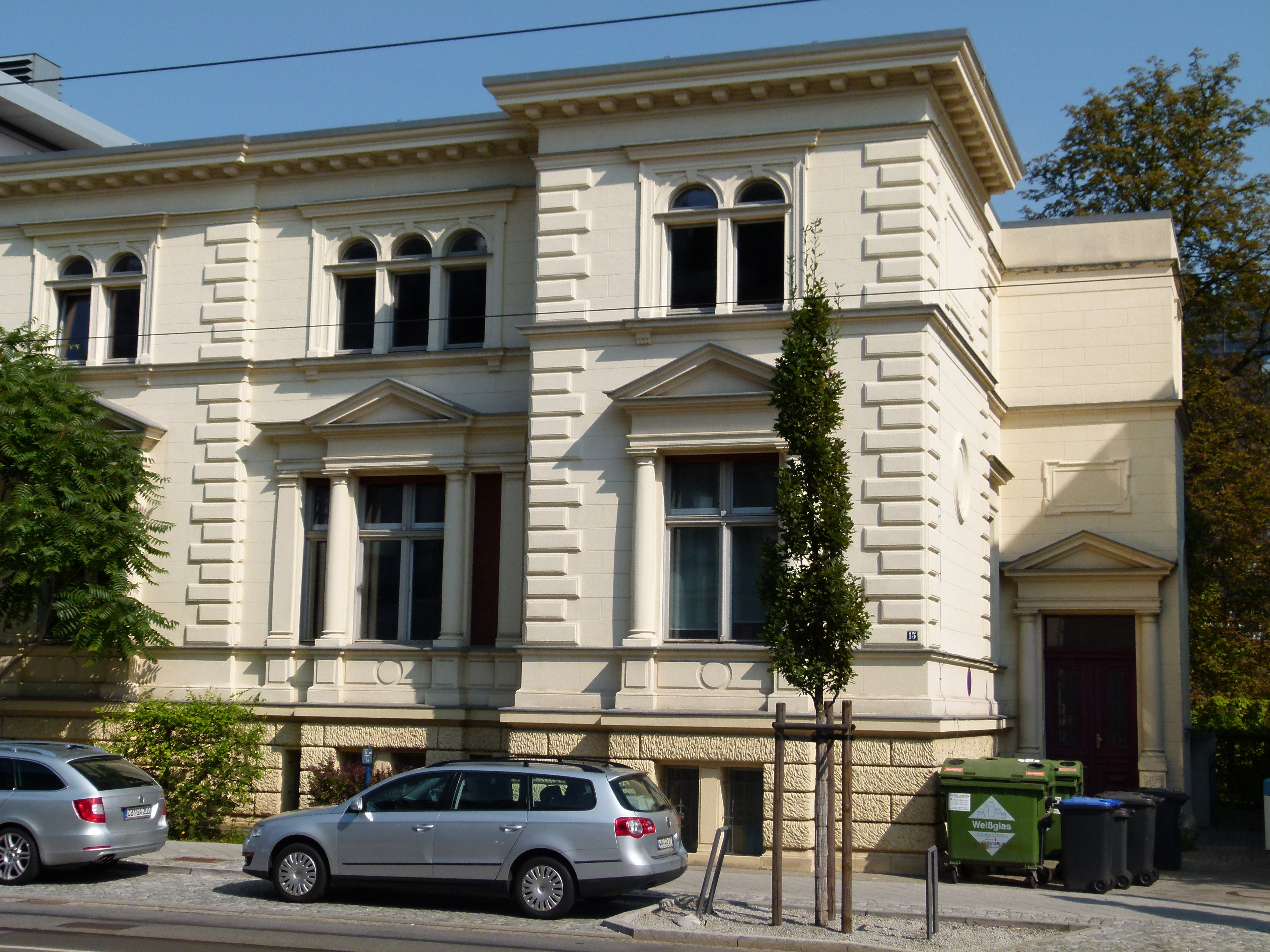 15 Bahnhofstraße 2014